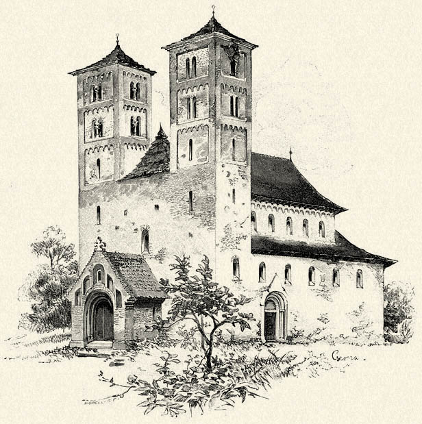 Biserica Reformată-Calvină din Acâş